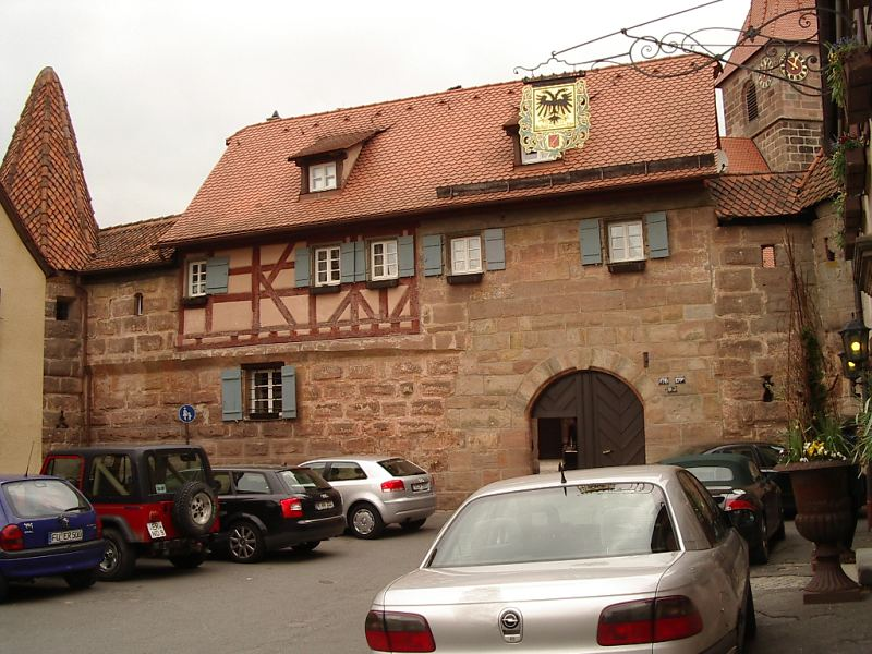 Kraftshof, Stadtteil von Nürnberg, südlicher Zugang zur Wehrkirche, von SSW (2004-05-01).